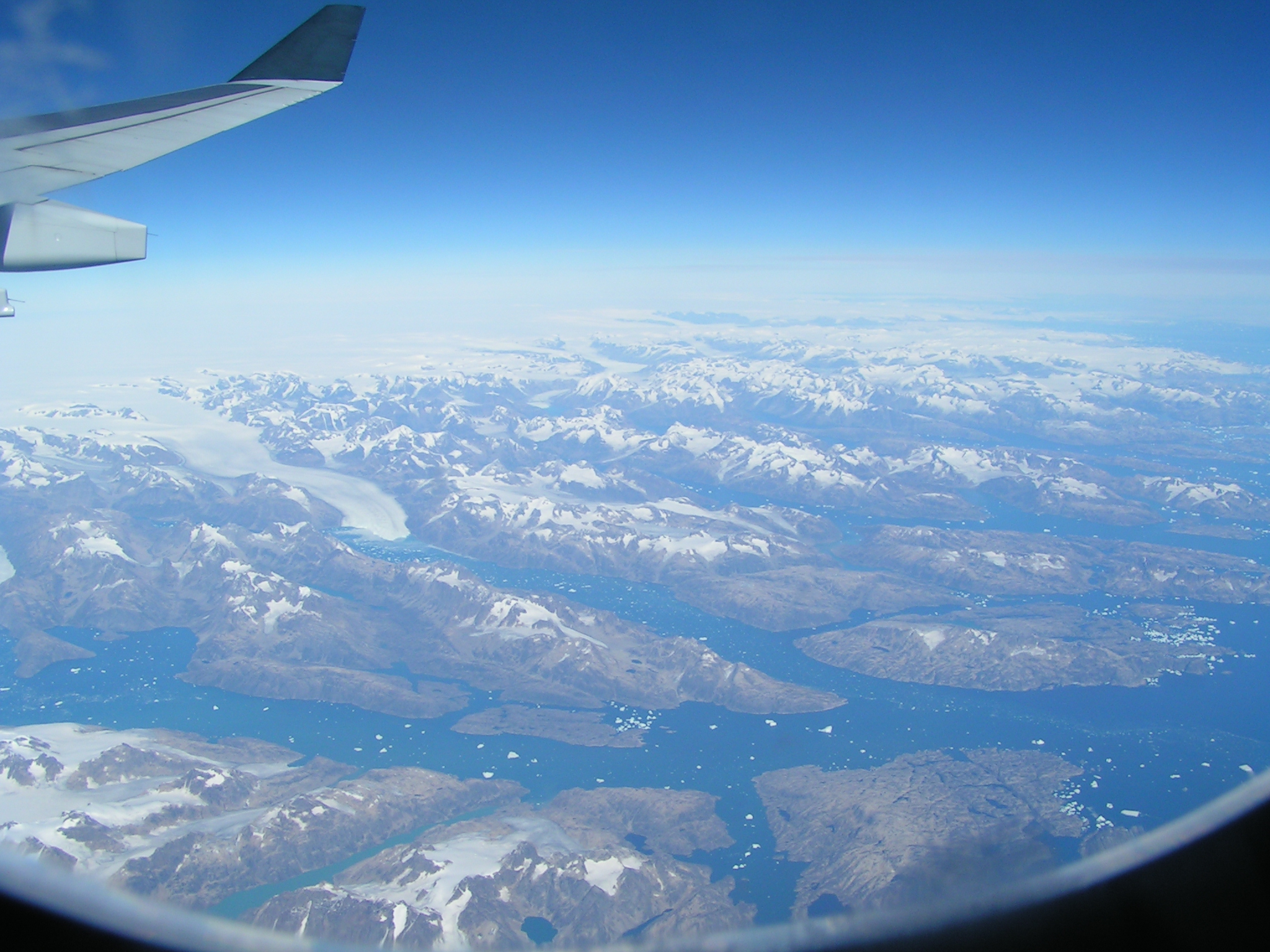 King Frederick VI Coast